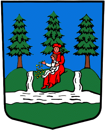 Wappen von Troistorrents Kanton Wallis Schweiz